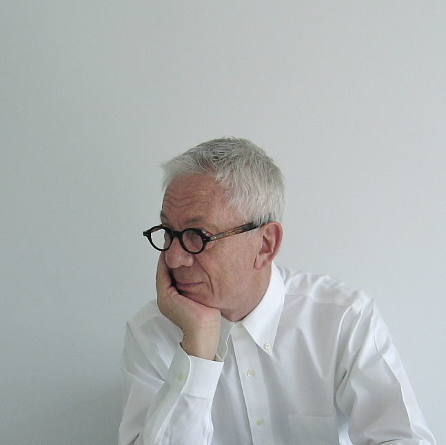 Miles Gibson.